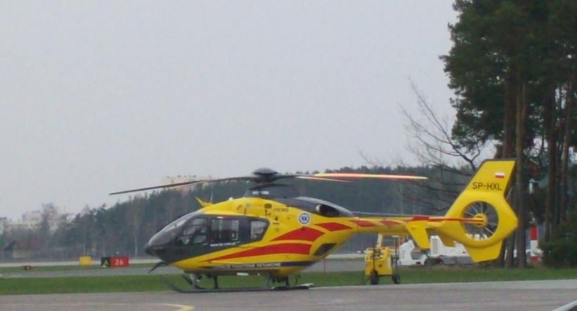 Helikopter lotniczego pogotowia ratunkowego na płycie lotniska w Bydgoszczy.